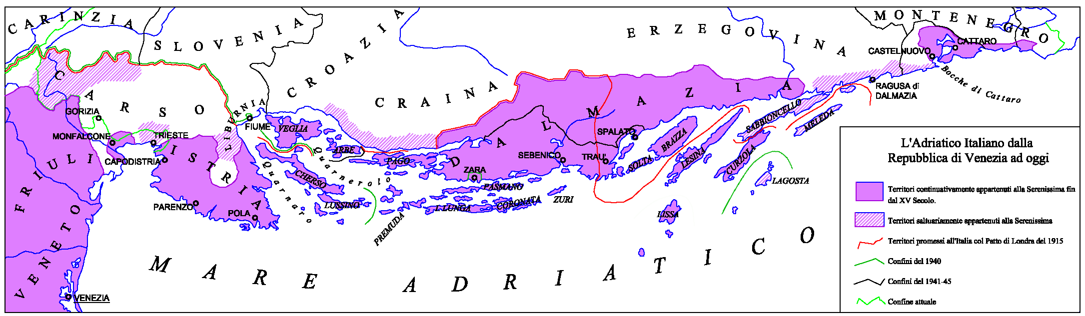 carta dell'Adriatico Orientale dal punto di vista italiano